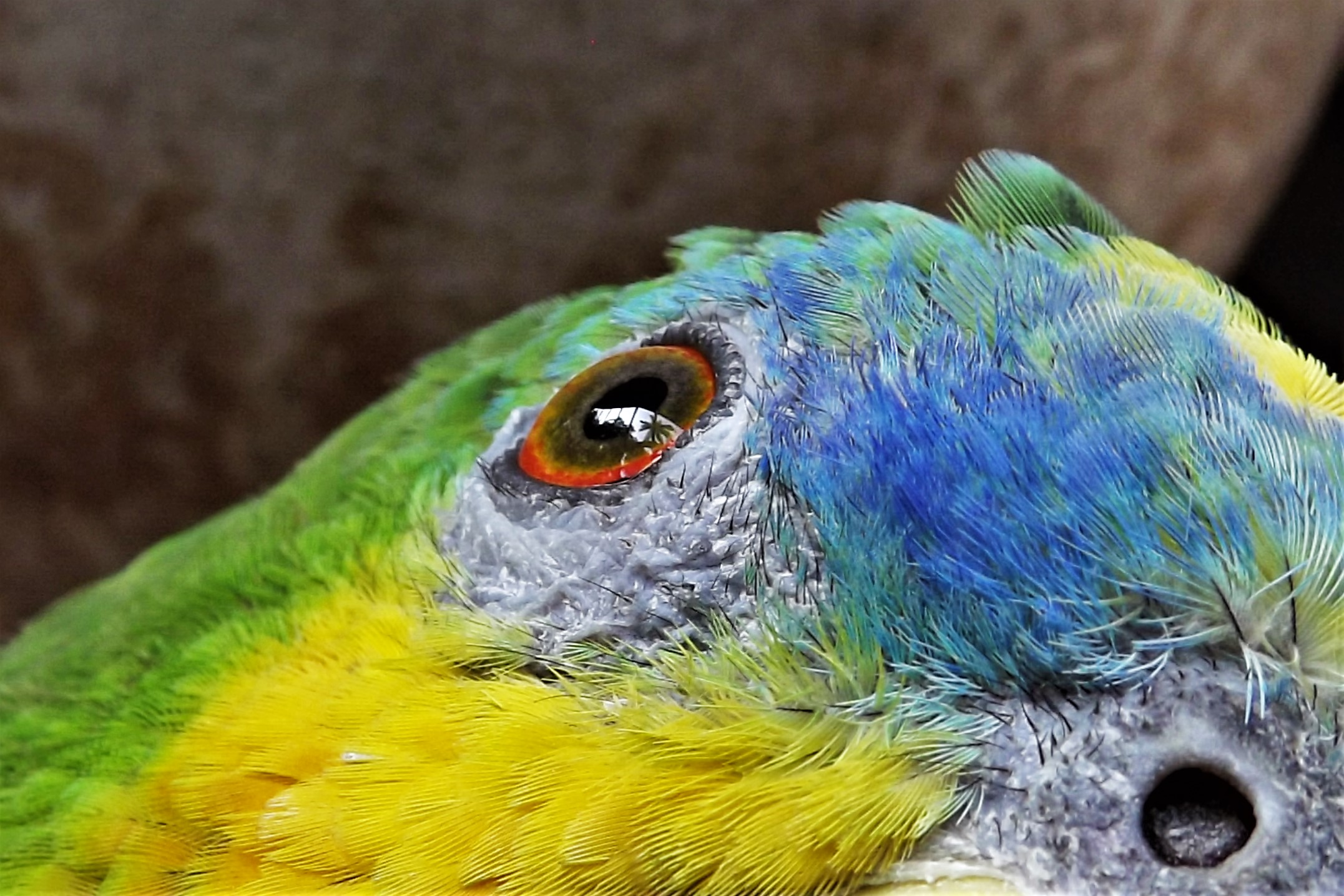 Detalle de Ojo y plumas de la cara